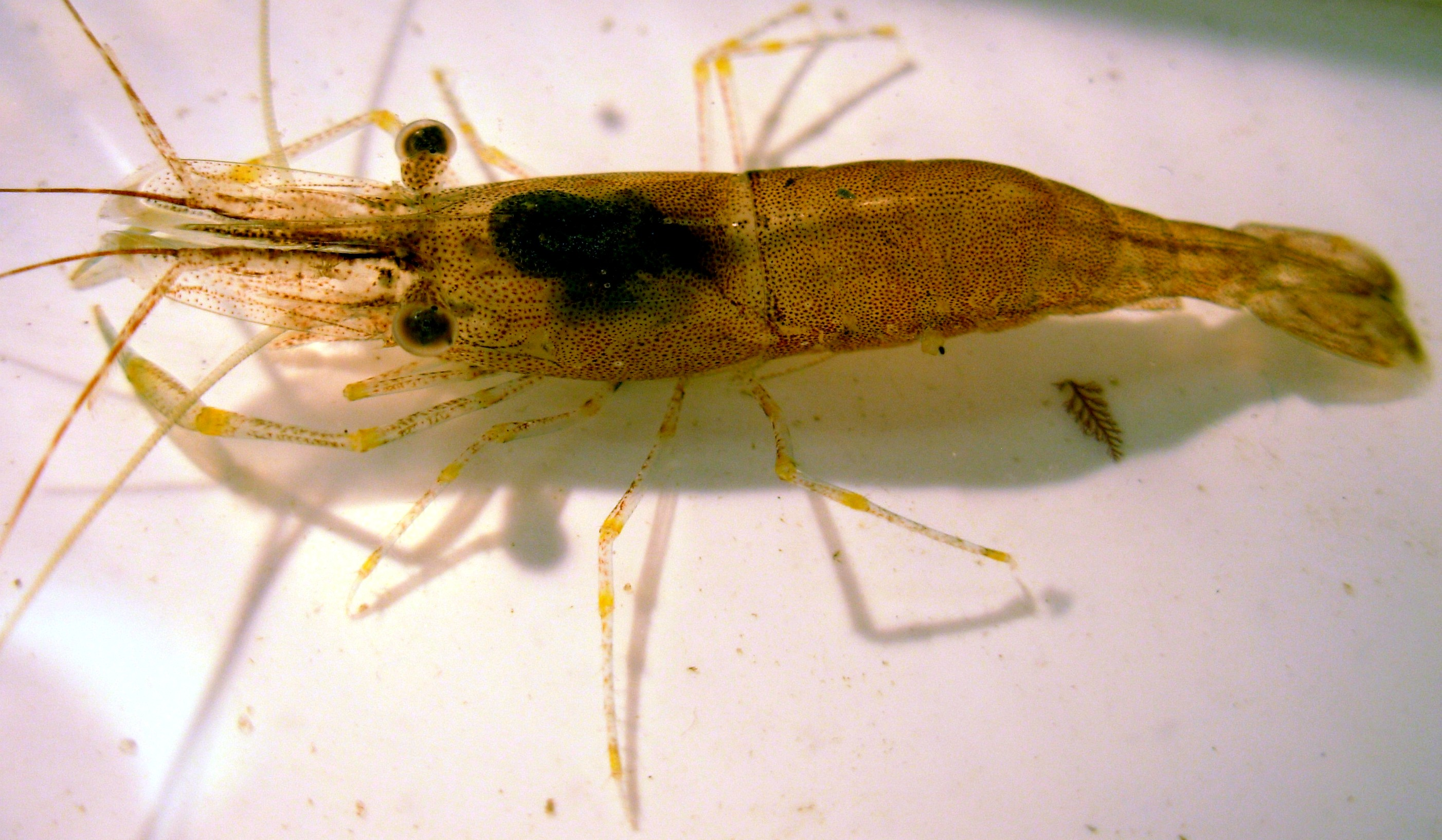 Palaemon adspersus, crevette, vue de l'animal entier